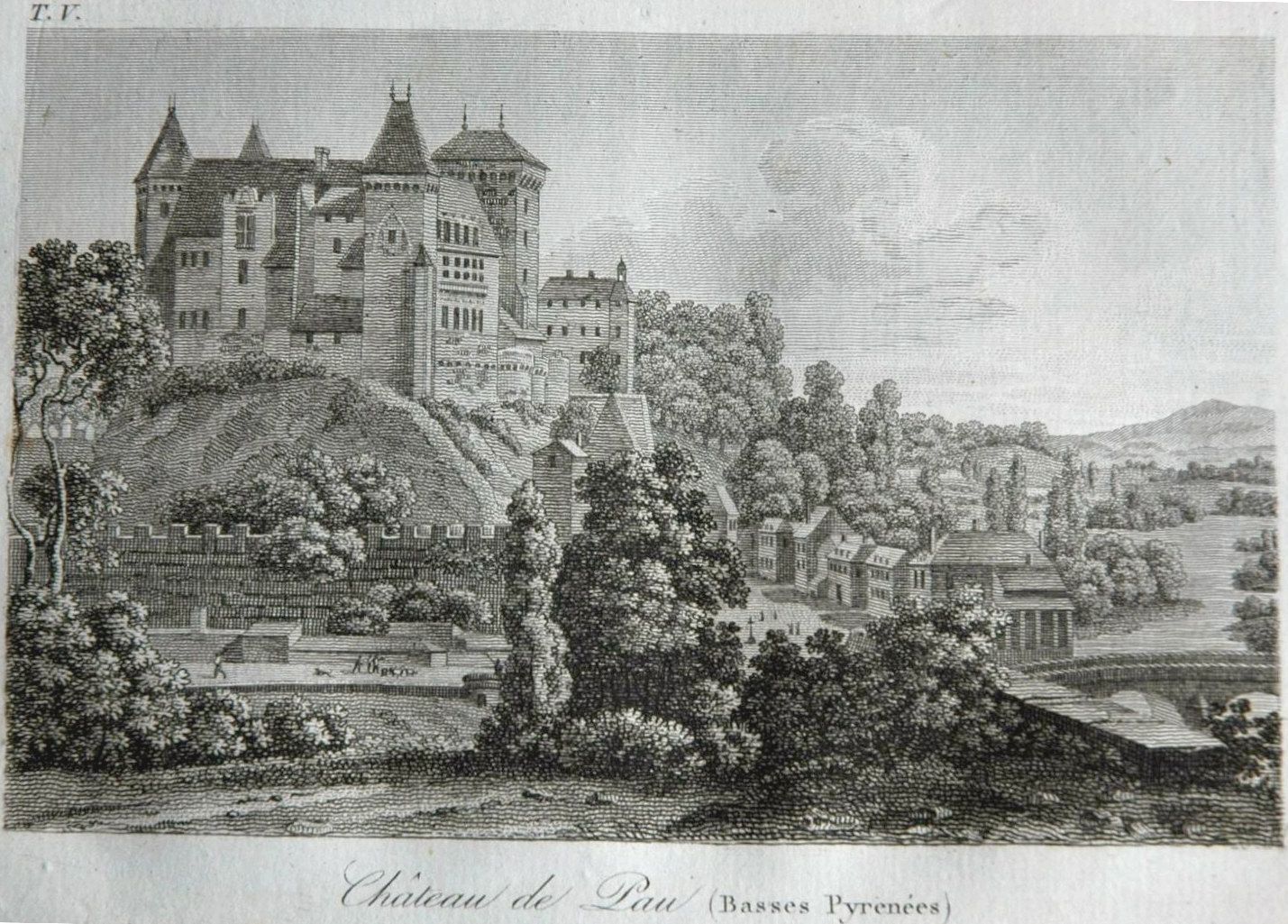 Gravure du Château de Pau (Basses-Pyrénées, France).